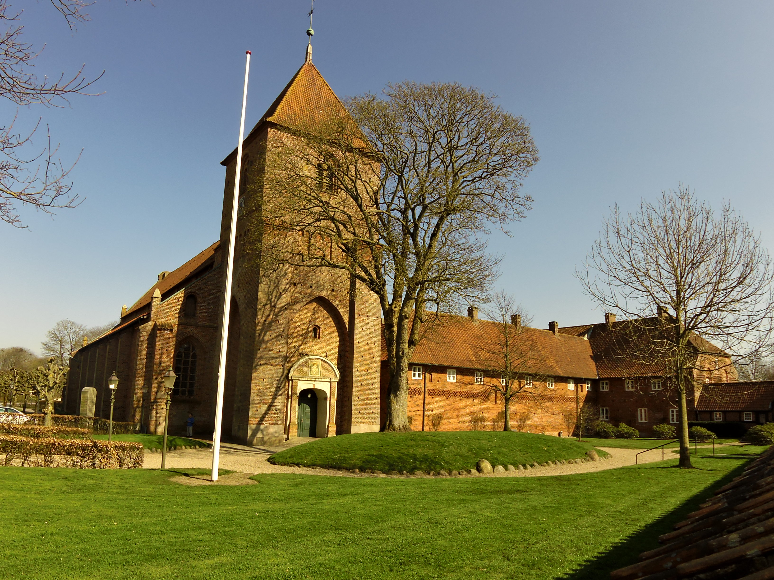 Forsiden af Sct Catharinæ Kirke